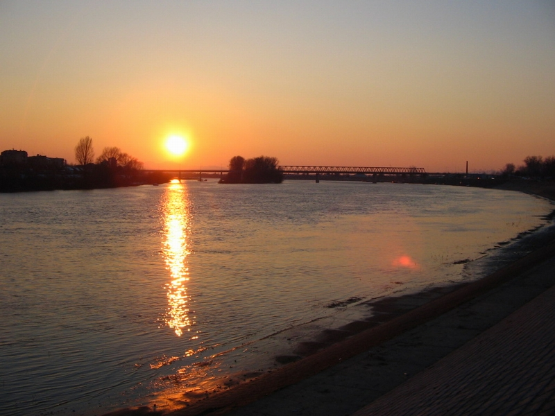 Most preko rijeke Save u Slavonskom Brodu